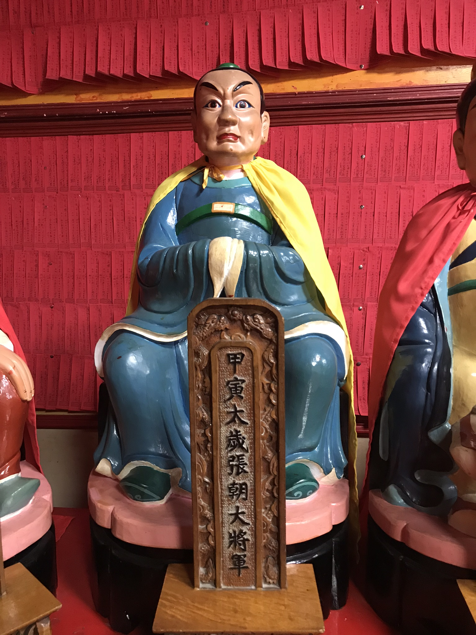 甲寅太歲張朝大將軍神像